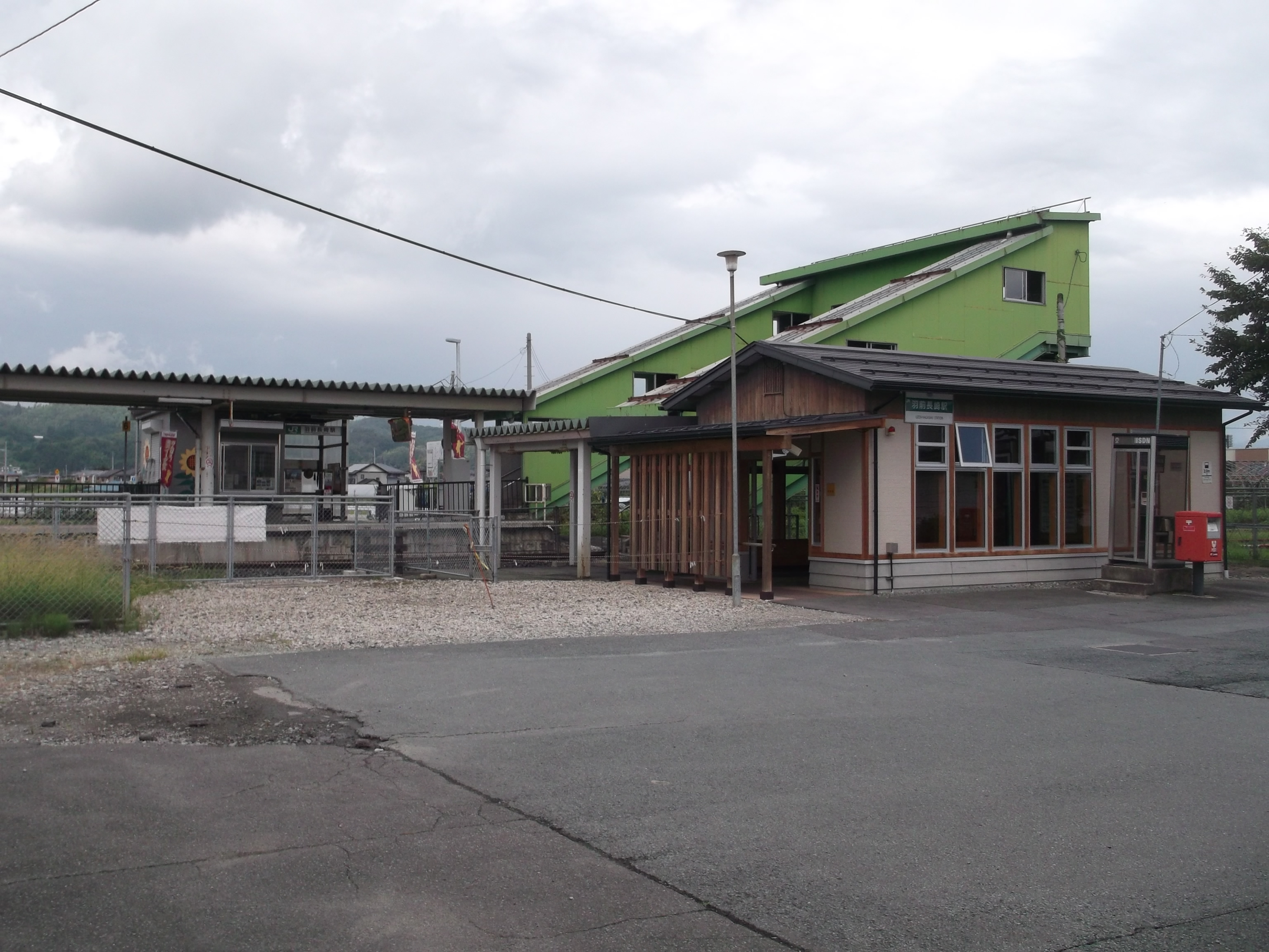 羽前長崎駅東口全景